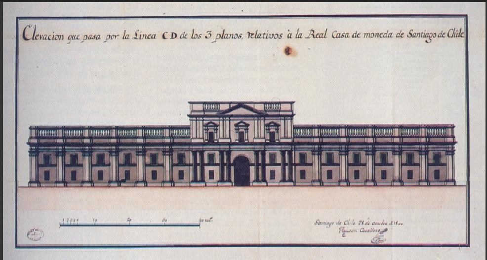 Elevación de la Real Casa de Moneda de Santiago, dibujo de Agustín Cavallero, 1800. Archivo General de Indias, Sevilla. Real Palacio de la Moneda (obra neoclásica del arquitecto Joaquín Toesca y Ricci, construida entre 1784 y 1805). La posición del Palacio de Gobierno, aún cuando se encuentra separado de la Alameda por un bloque urbanizado, desde muy temprano incita a considerar la posibilidad de convertirlo en el foco de una perspectiva compuesta en el eje de una nueva avenida, proyectada en perpendicular al sur de la Alameda, de tal manera que entre ambos trazados mayores se forme un cruce fundamental para la organización formal de la ciudad. El edificio de La Moneda se acompaña de dos espacios abiertos, al norte la Plaza de La Constitución y al sur la Plaza de La Libertad, actualmente Plaza de La Ciudadanía. Alameda por medio se ubica siempre la Plaza Bulnes